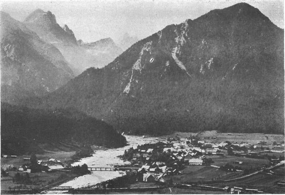 Kranjska Gora - Mojstrovka.